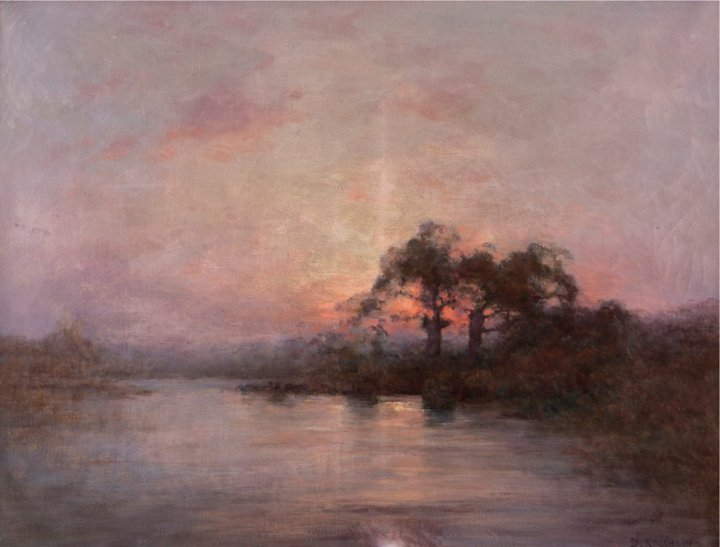 Coucher de soleil sur un lac, huile sur toile, 54 x 73 cm. Tableau vendu à Lyon le 24 mai 2018 (471 euros).